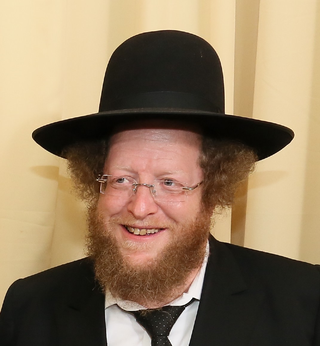 תמונת פנים